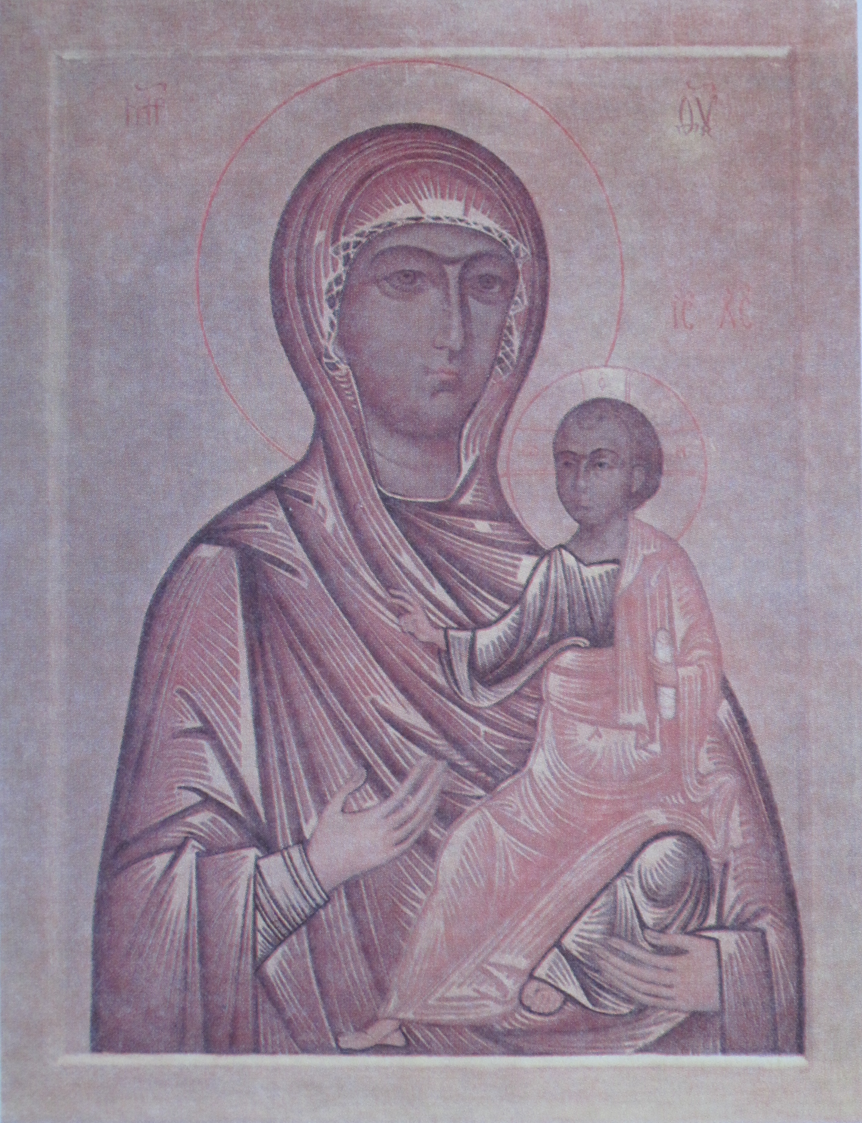 Абраз Маці Божай Адзігітрыі Полацкай, сучасная копія Таропецкай іконы (12—14 ст.)